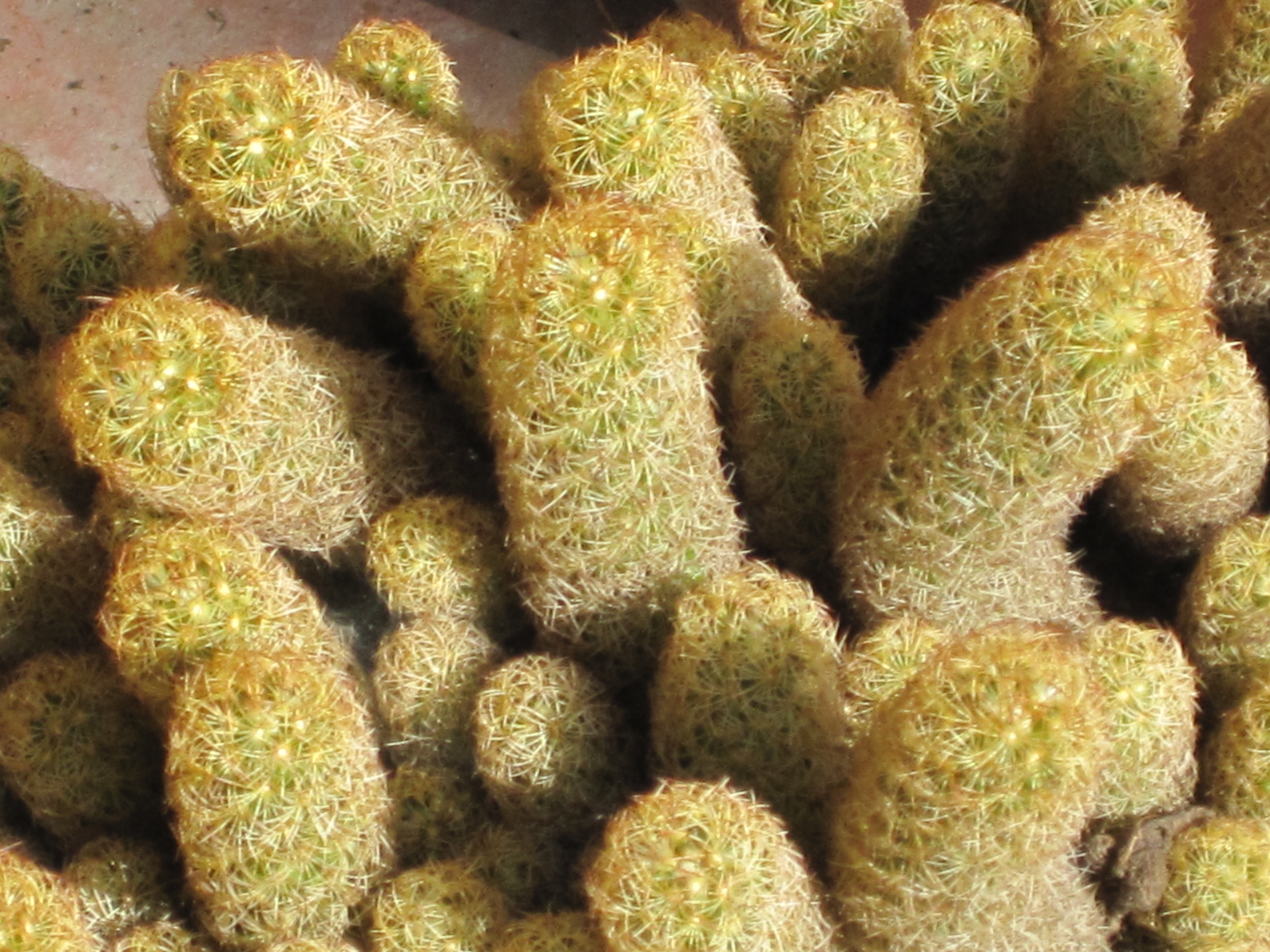 Mammillaria elongata - particolare